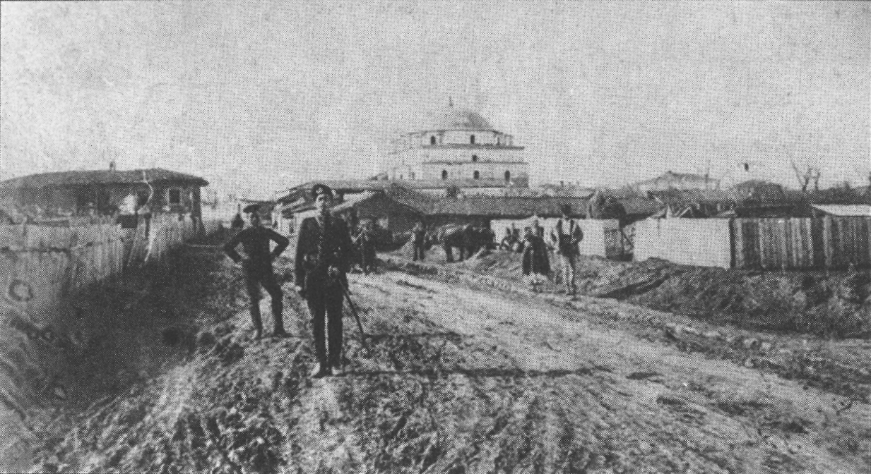 Улица "Самоковска" (днес "Граф Игнатиев") в София с Черната джамия, снимка от 1887 година